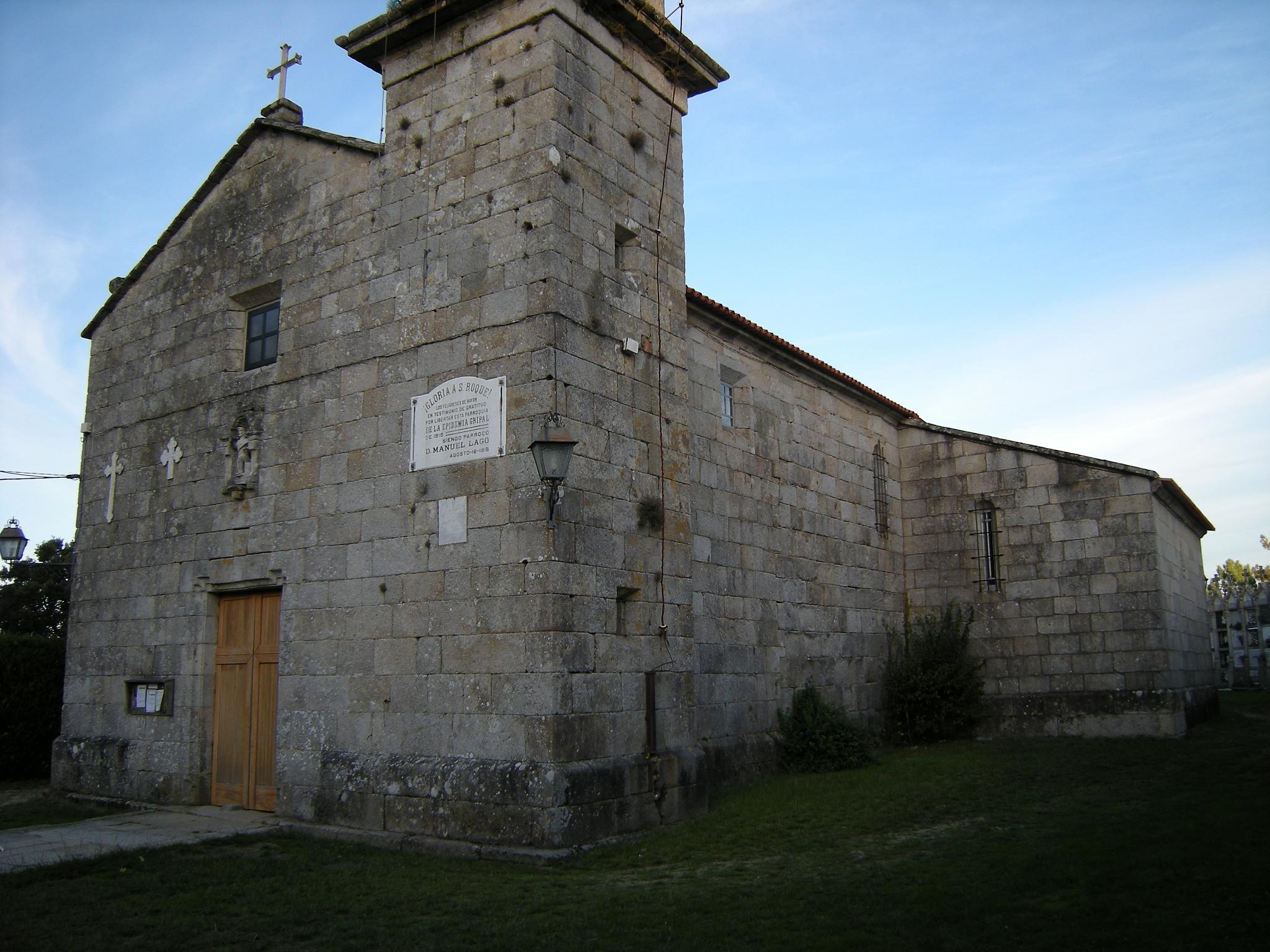 Iglesia de una nave, con dos capillas laterales a modo de transepto. De su primitiva construcción, solamente conserva su cabecera de planta rectangular.